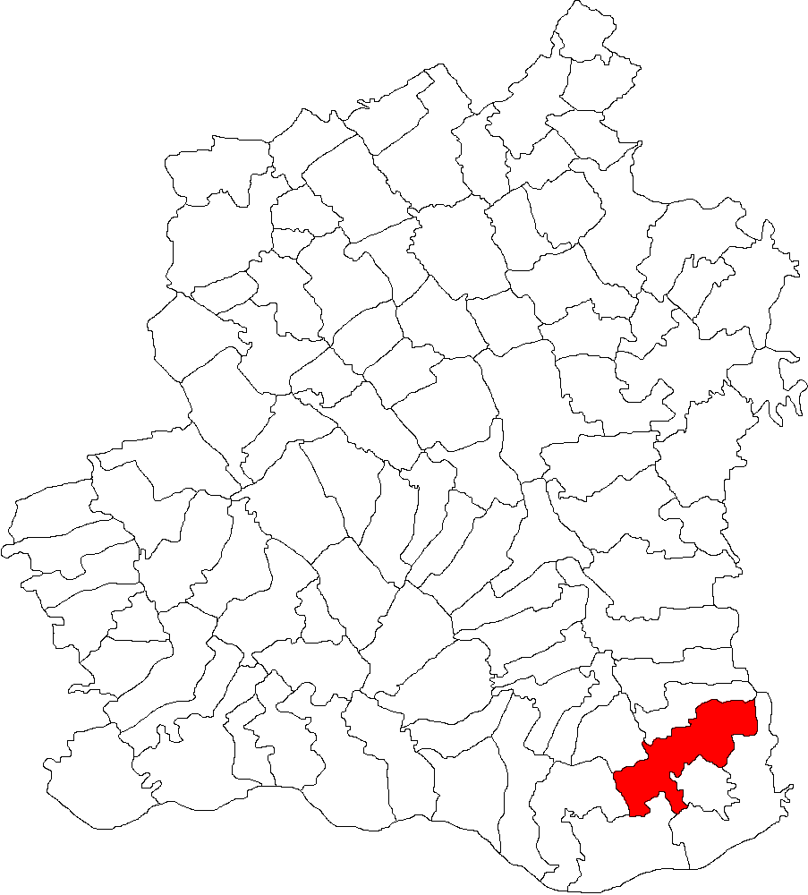 Categorie:Hărţi ale judeţului Teleorman